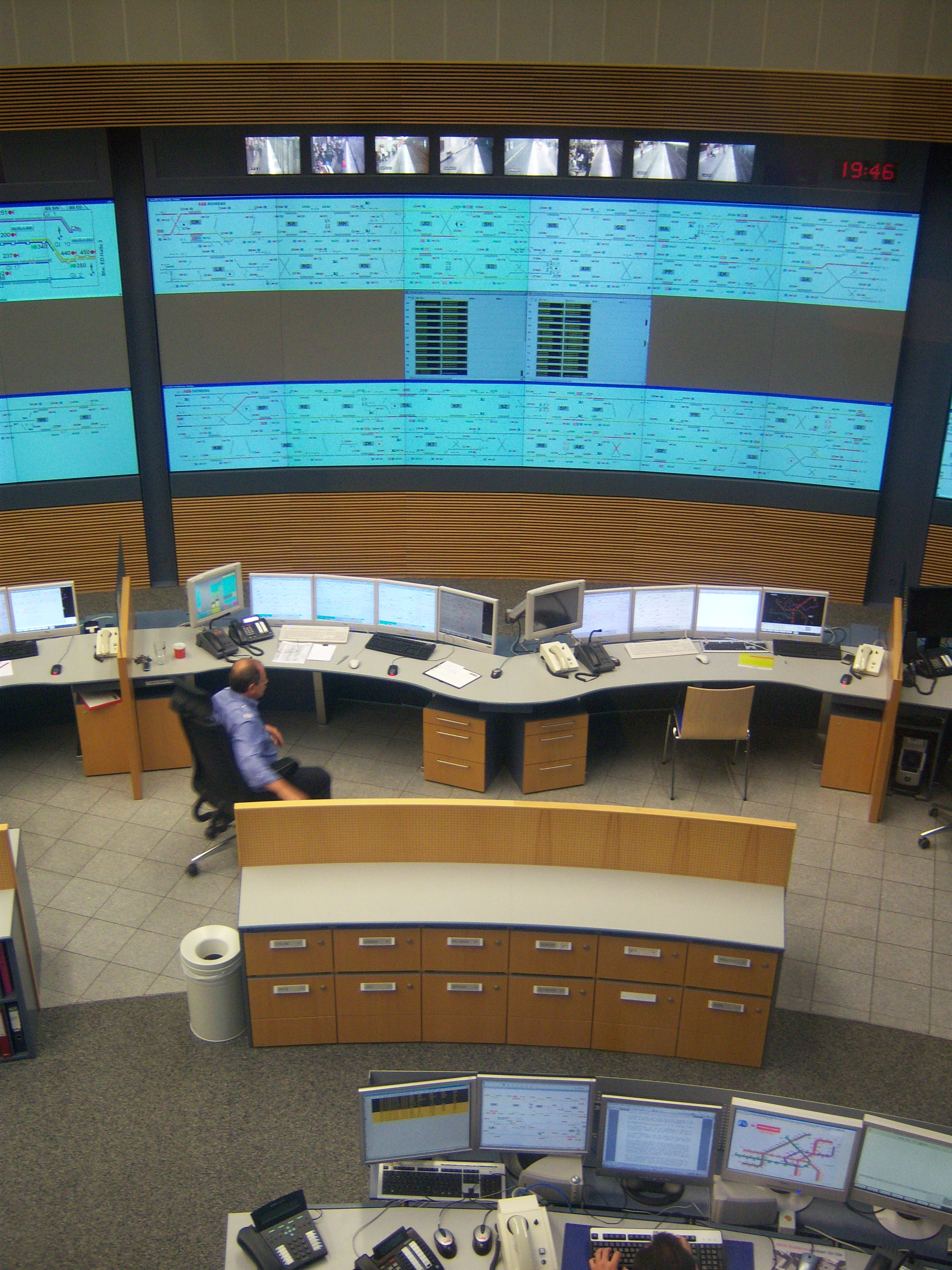 Leitstelle Erdberg der Wiener U-Bahn